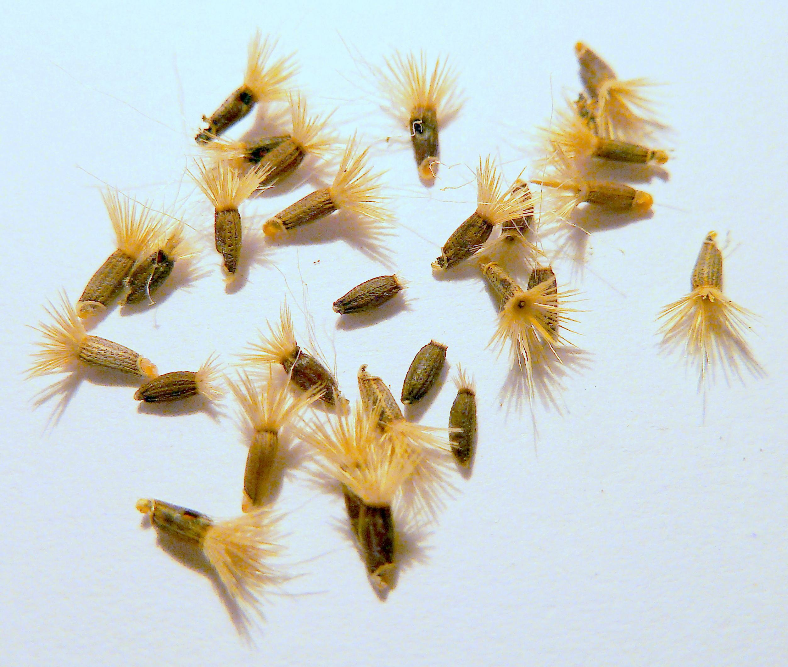 Mantisalca salmantica (cabezuela, pan de pastor, ...) - Cipselas, algunas aún con su eleosoma - Circa Estación de Contenedores de RENFE/ADIF de Abroñigal/Embajadores, Madrid (España).